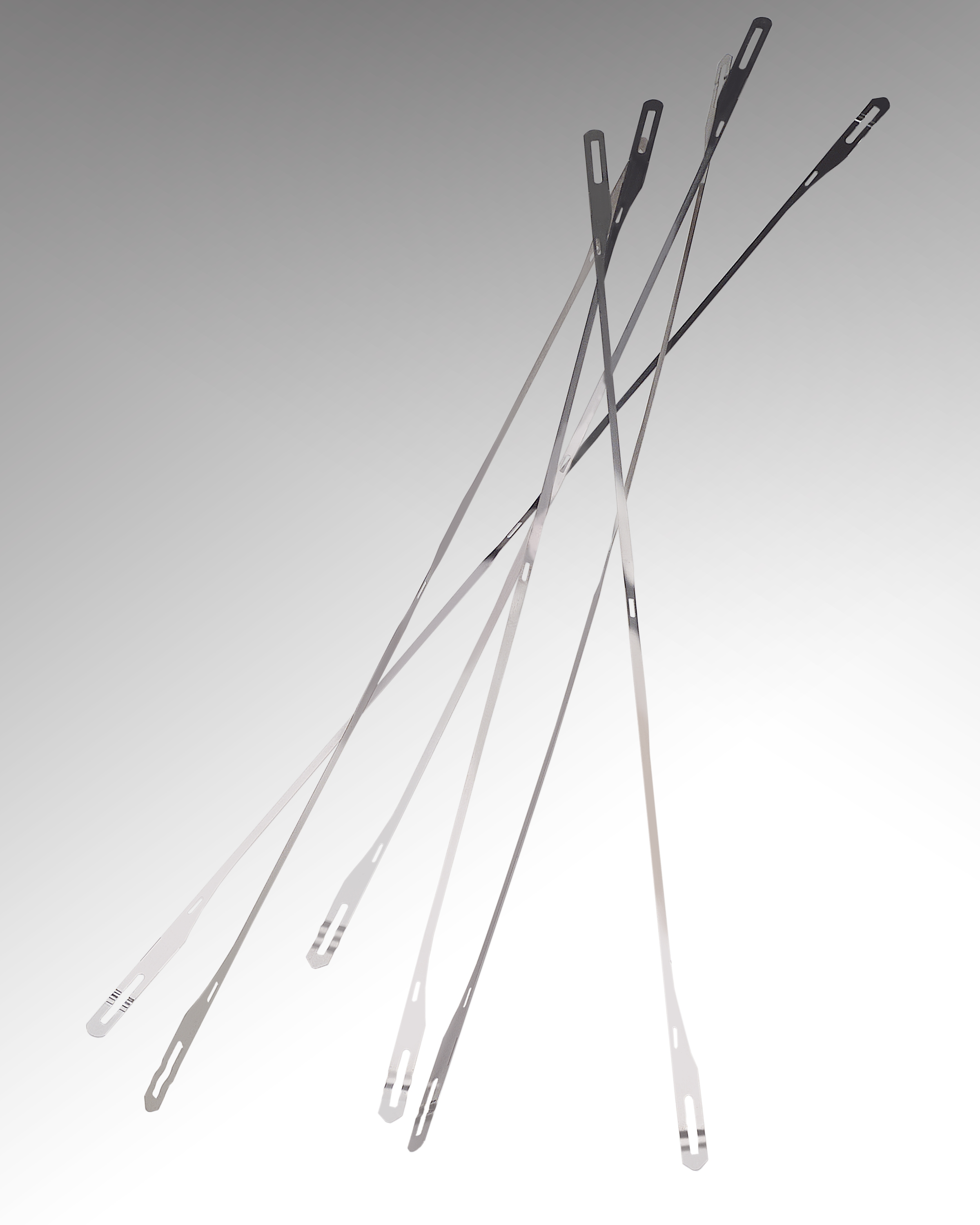 photos electroless nickel